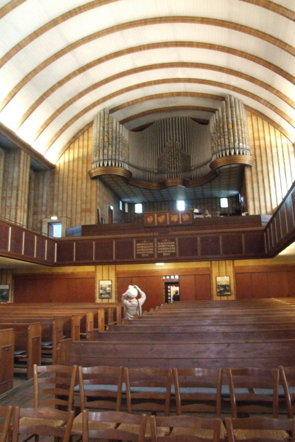 Martin-Luther-Gedächtniskirche Berlin-Mariendorf, Innenraum und Orgel Fotograf: Harald Rossa Datum: September 2006 Höher aufgelöste Version ist verfügbar